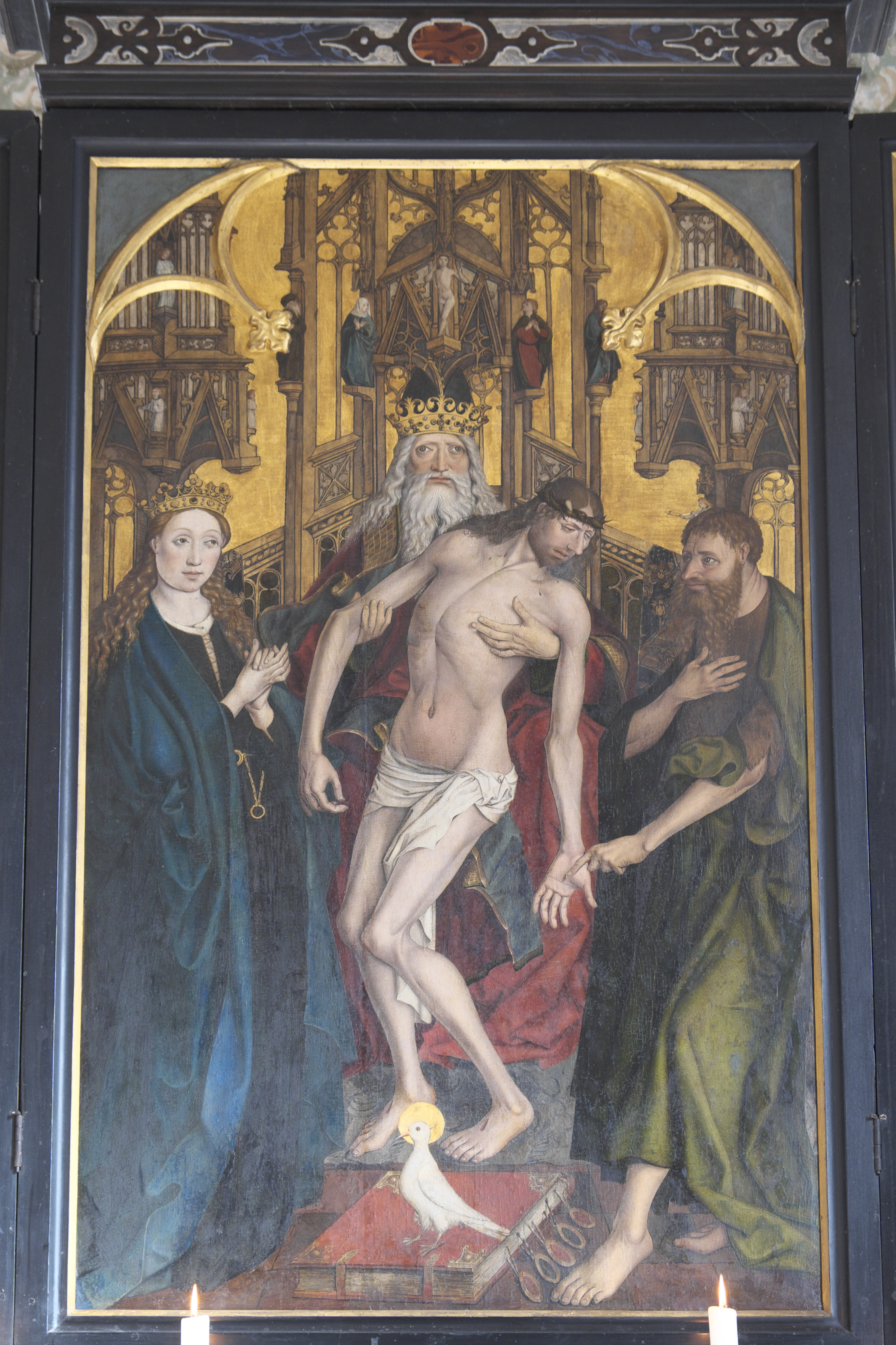 Katholische Friedhofskirche St. Salvator und Sebastian in Weilheim in Oberbayern im Landkreis Weilheim-Schongau (Bayern/Deutschland), Choraltar mit Tafelbildern um 1470/80; Darstellung: Gnadenstuhl mit Maria und Johannes dem Täufer (Mitte)